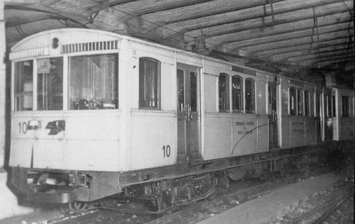 Coche 10 La Brugeoise, con esquema de colores CTAA y logotipo de la Corporación